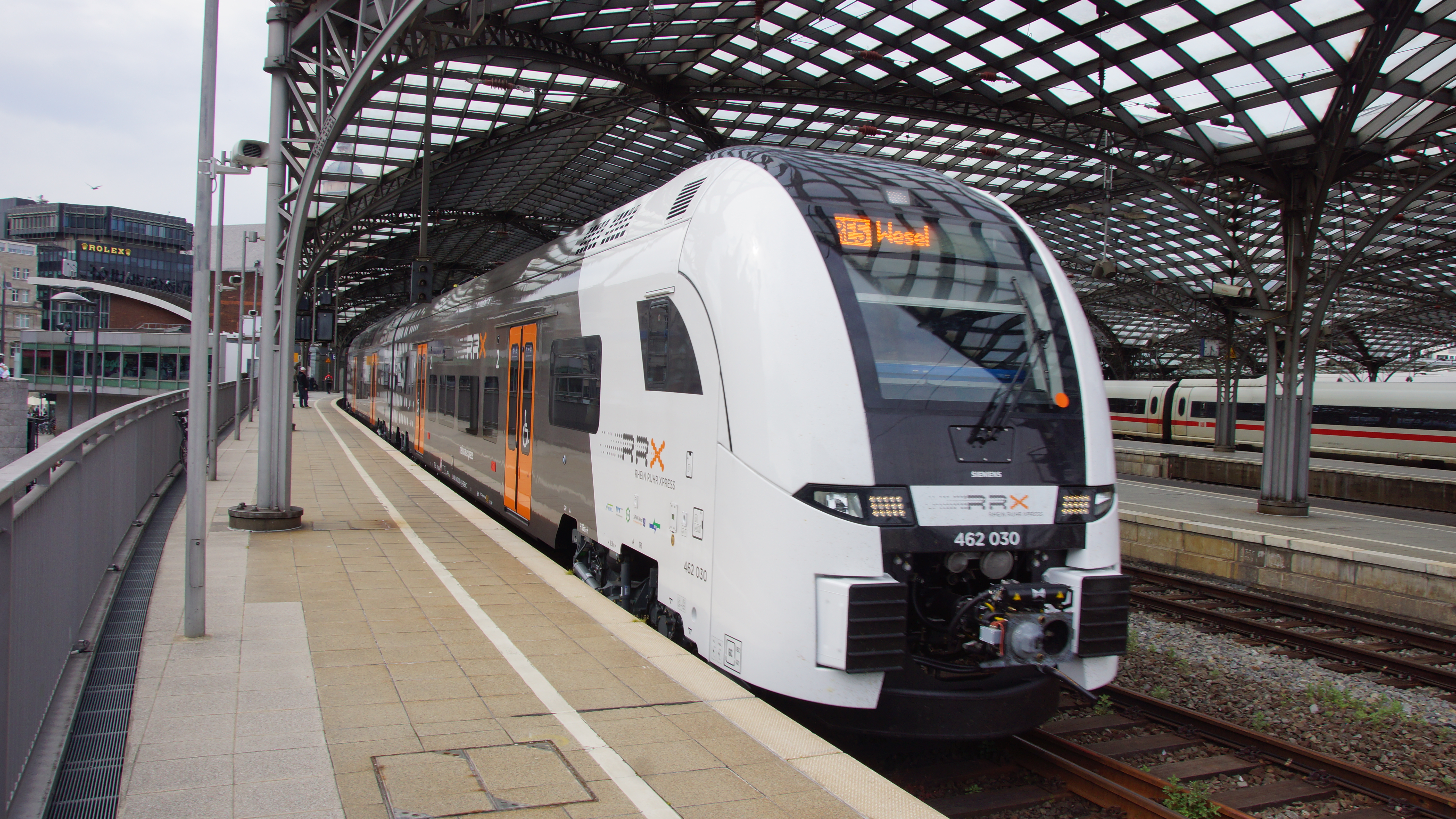 Köln Hauptbahnhof Gleis 1 mit RRX-Zug des RE5 Rhein-Express, Siemens Desiro HC 462030 und 462028, Ausfahrt Richtung Deutz